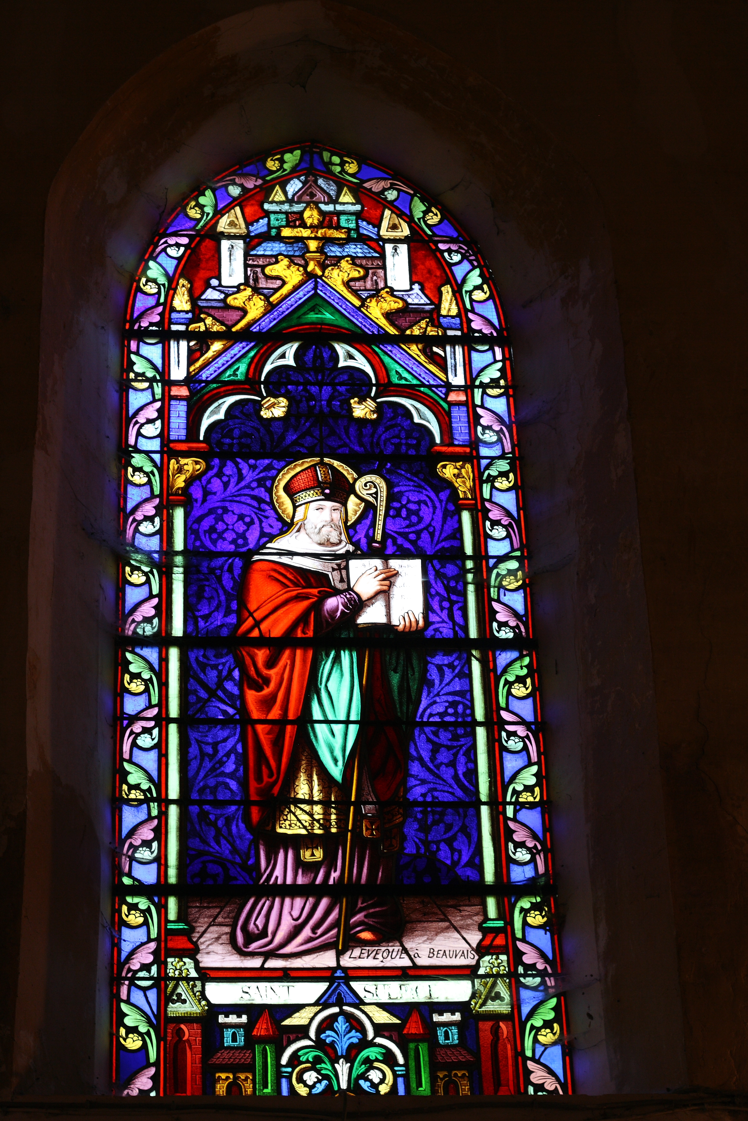 Katholische Kirche Saint-Sulpice in La Celle-sur-Morin im Département Seine-et-Marne in der Region Île-de-France (Frankreich), Bleiglasfenster, Darstellung: hl. Sulpicius I. von Bourges; Signatur: LEVEQUE à BEAUVAIS